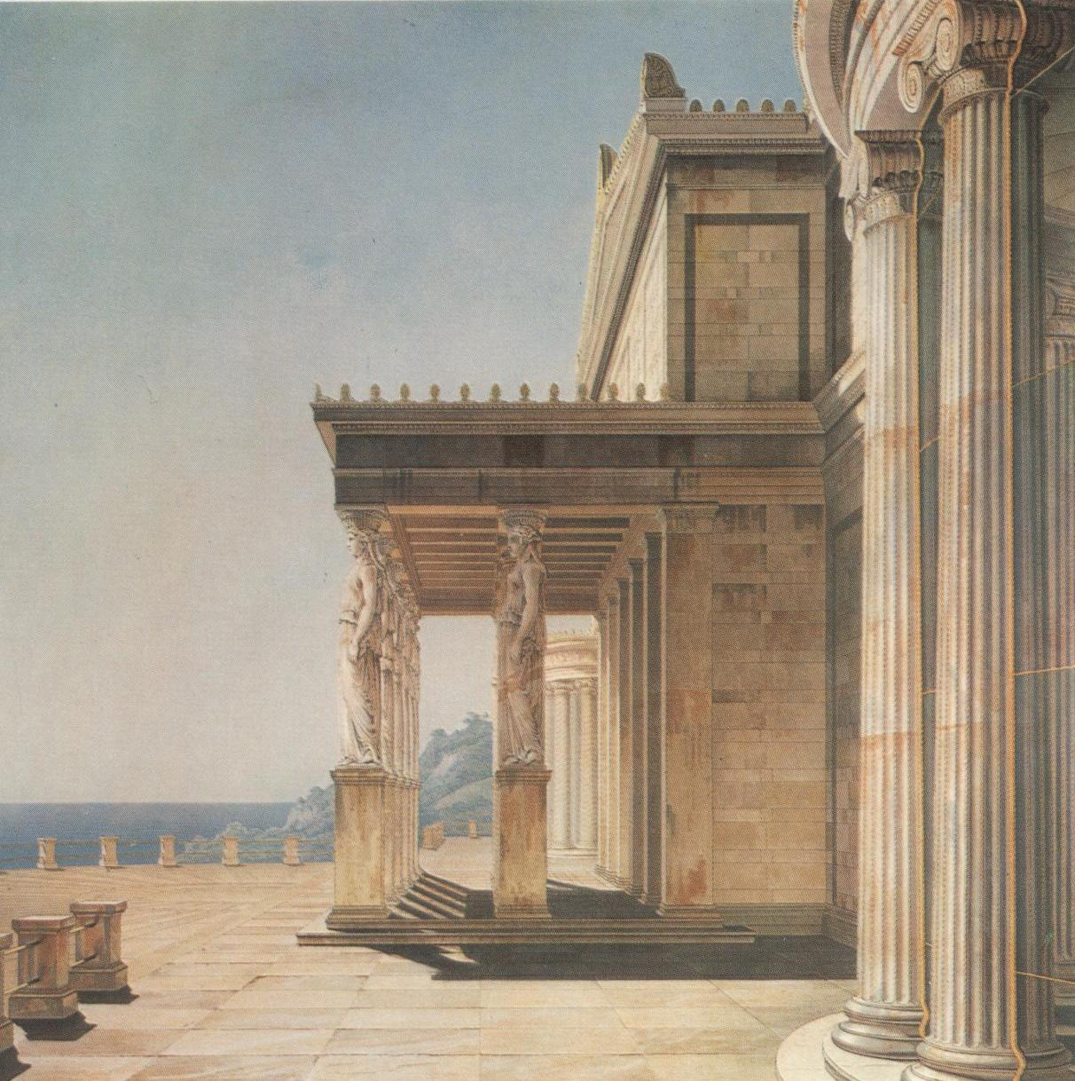 Karl Friedrich Schinkel, Terrasse des Schlosses Orianda auf der Krim, 1838